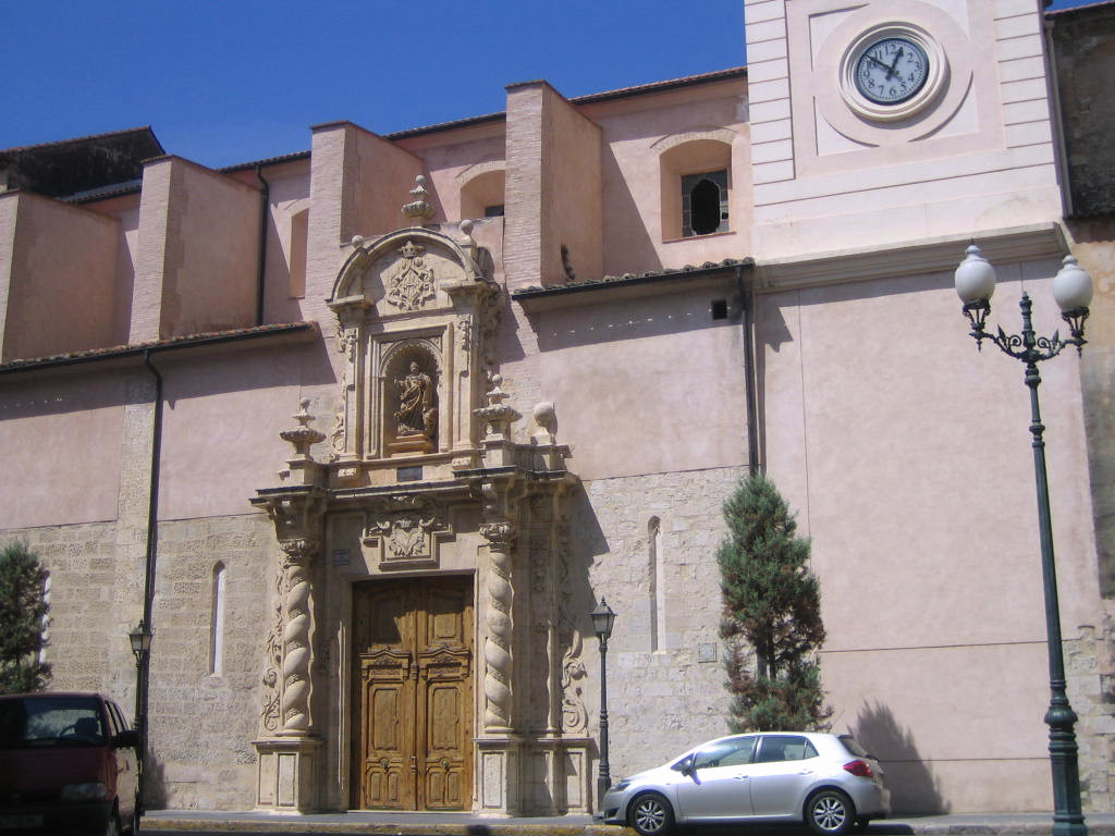 Fachada barroca de la Iglesia Arciprestal de Santa Catalina de Alzira (España).